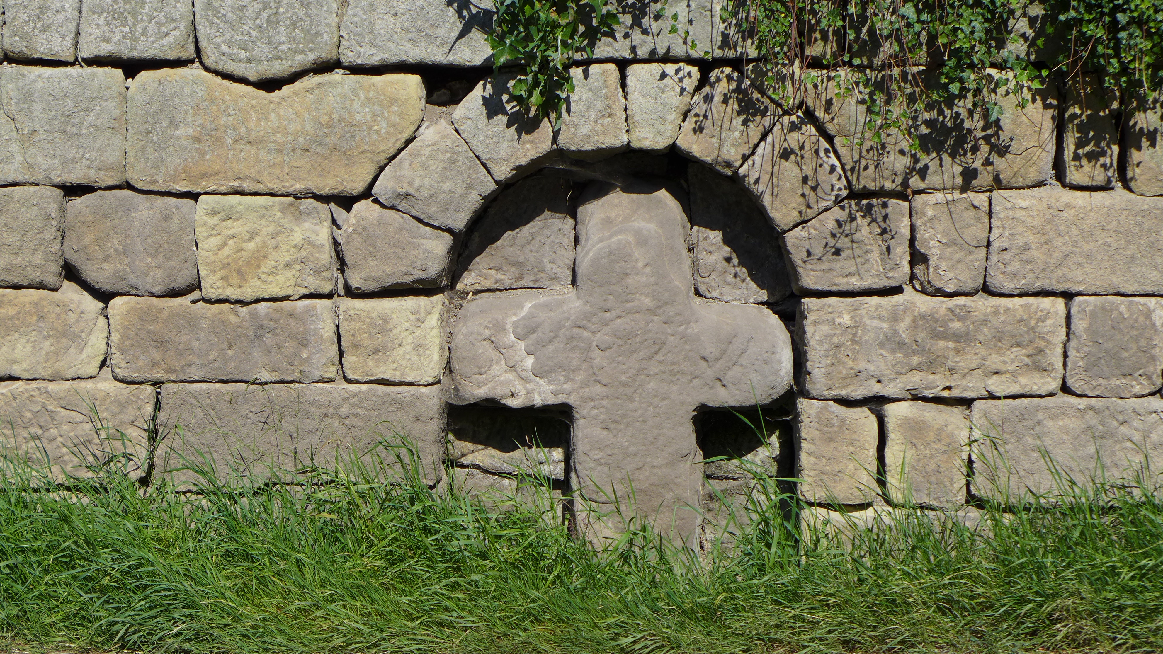 Smírčí kříž, vlevo u silnice směrem do Broumova v ohradní zdi u čp. 20, Pěkov.